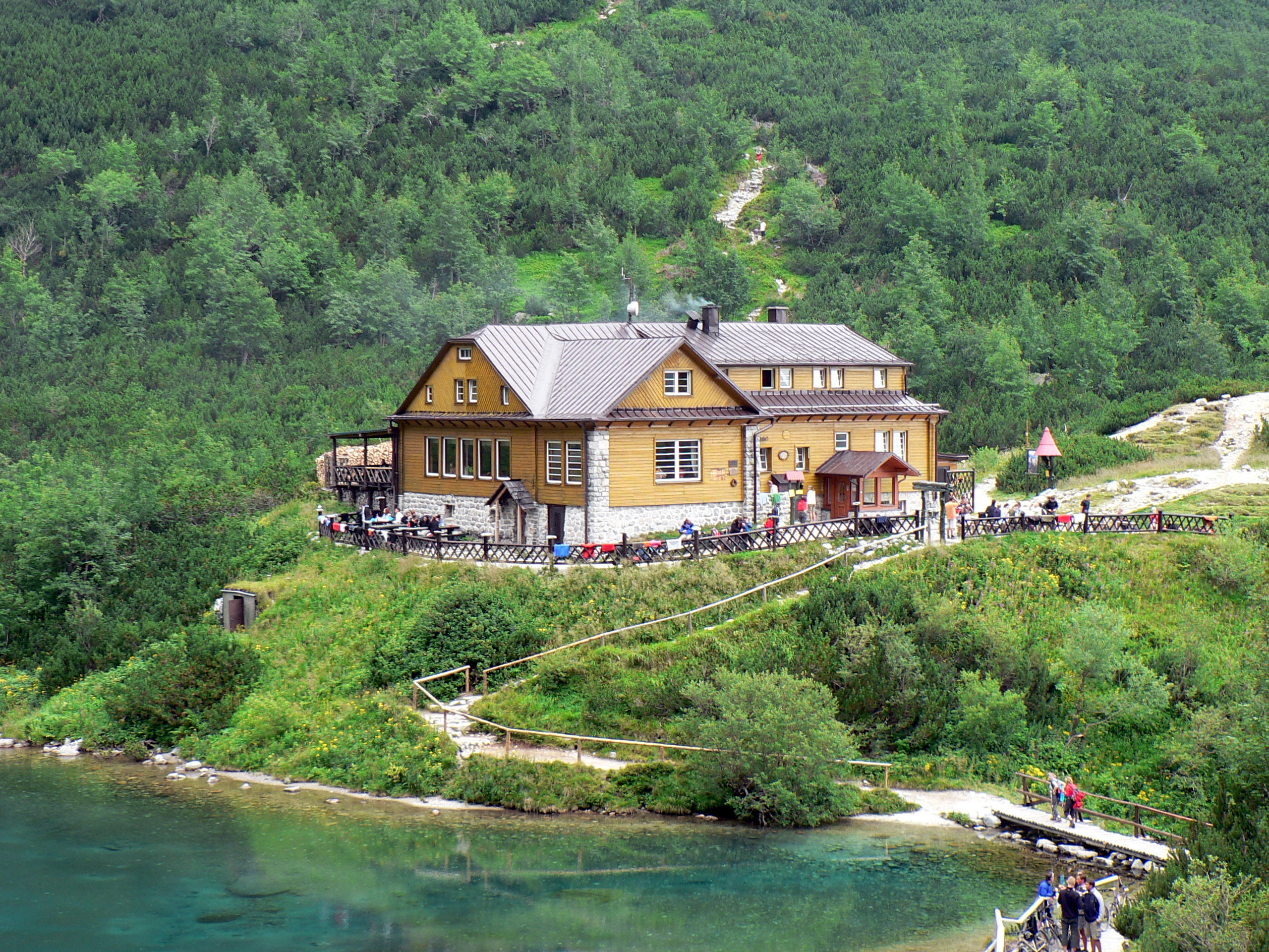 Schronisko nad Zielonym Stawem Kieżmarskim